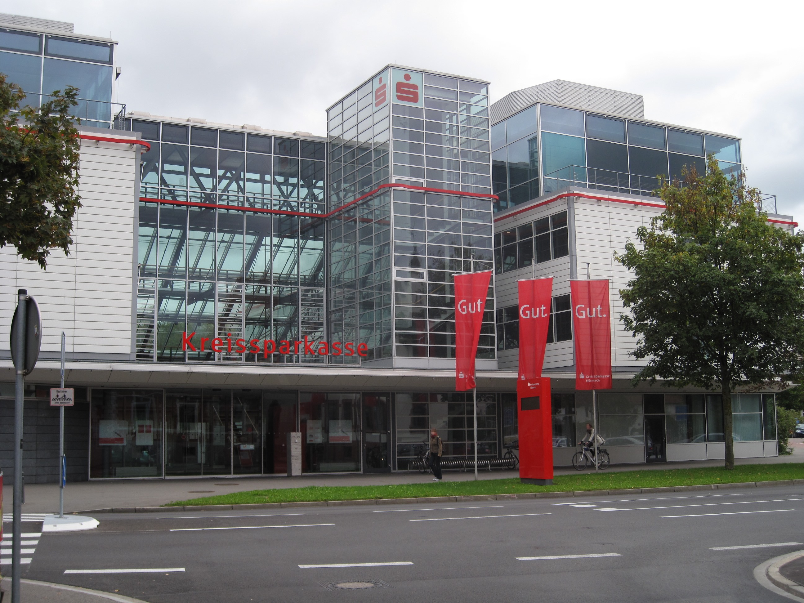 Kreissparkasse Biberach, Zeppelinring 27 in Biberach an der Riß.